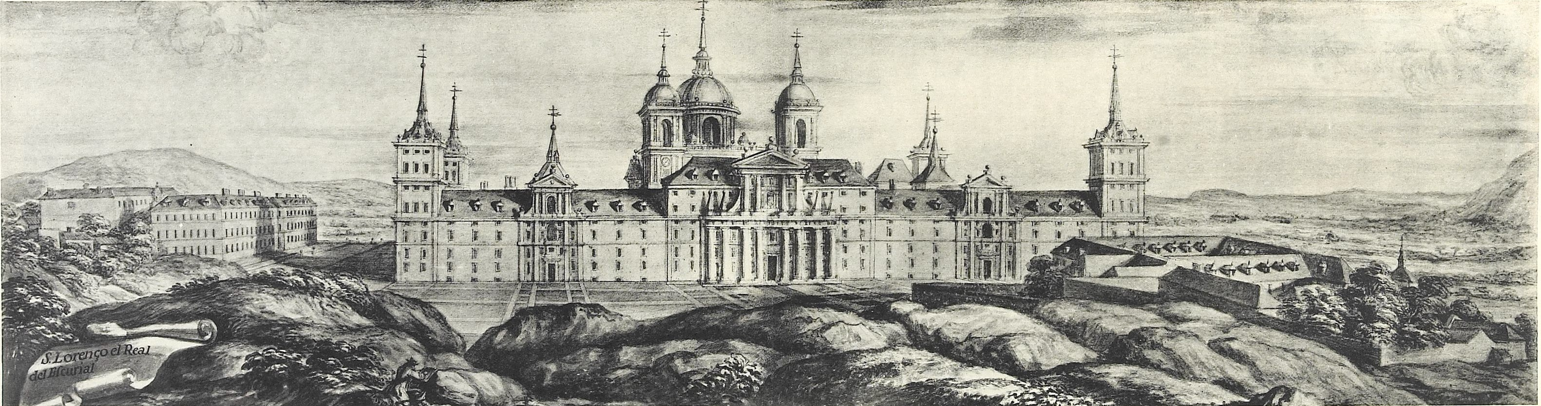 El Escorial, acuarela de Pier Maria Baldi, Biblioteca Laurenciana de Florencia, recogida en Sánchez Rivero A, Mariutti de Sánchez Rivero A. "Viaje de Cosme de Médicis por España y Portugal (1668-1669)", Madrid: Sucesores de Rivadeneyra; 1933